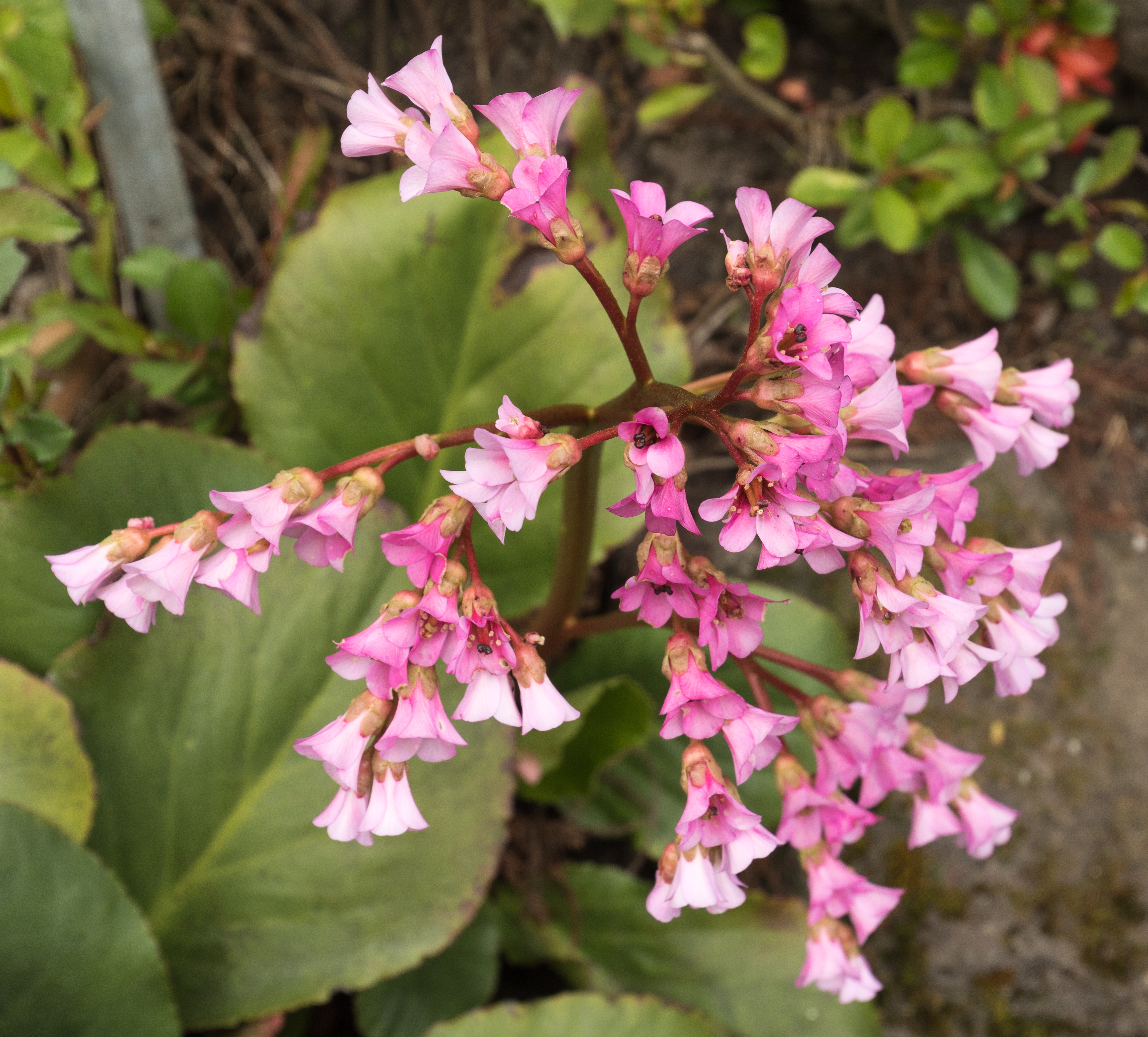 Himalaja-Bergenie (Bergenia stracheyi) im Alten Botanischen Garten der Georg-August-Universität Göttingen, April 2017